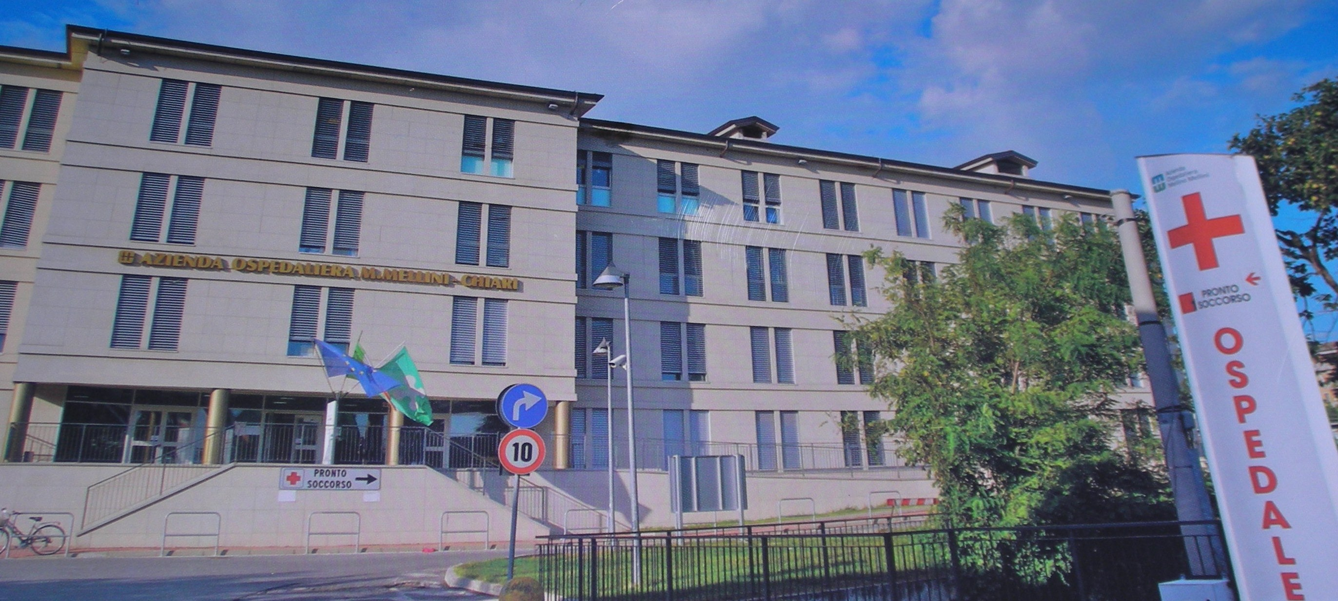 Ospedale Mellino Mellini Città di Chiari